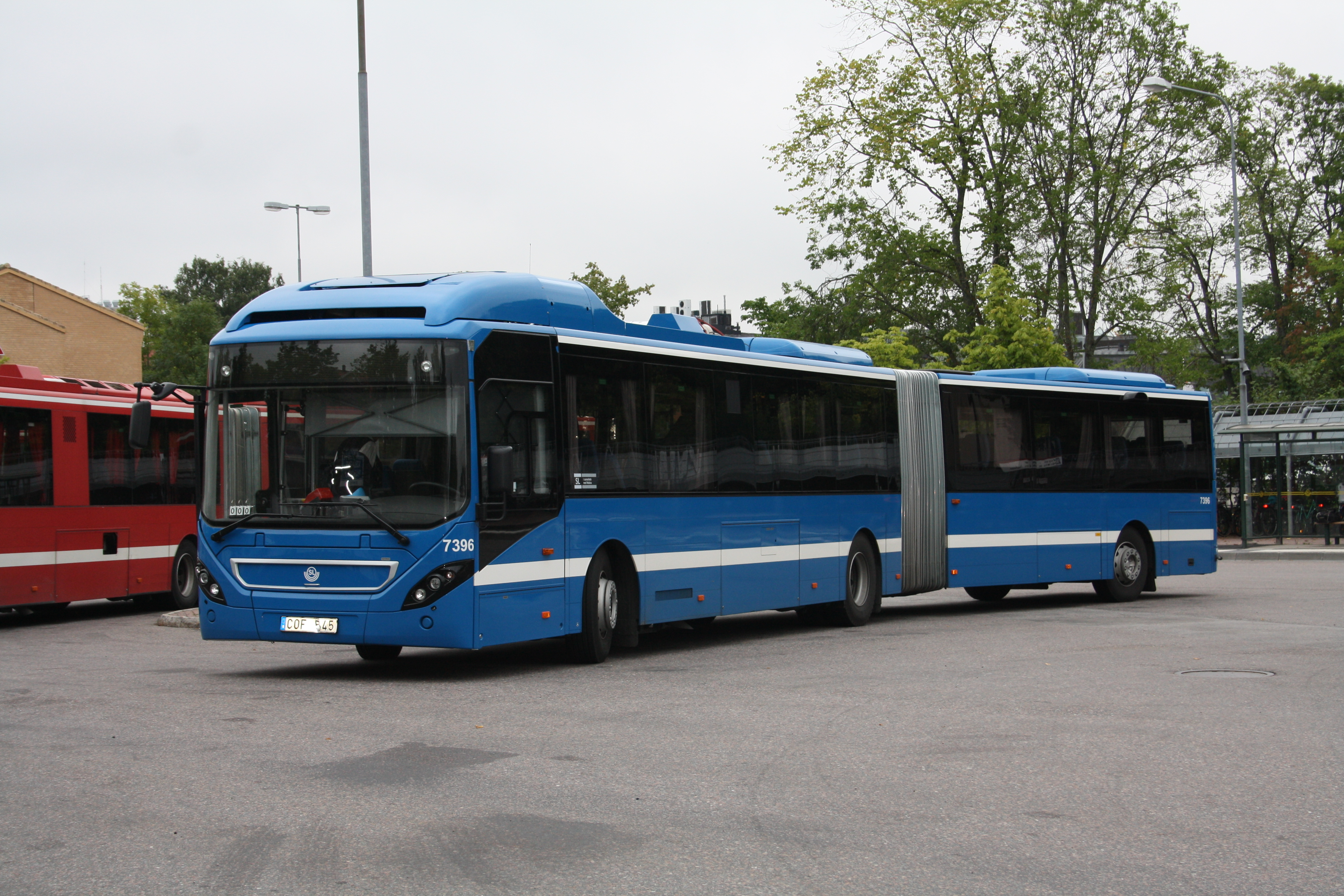 Bus at Norrtälje Station